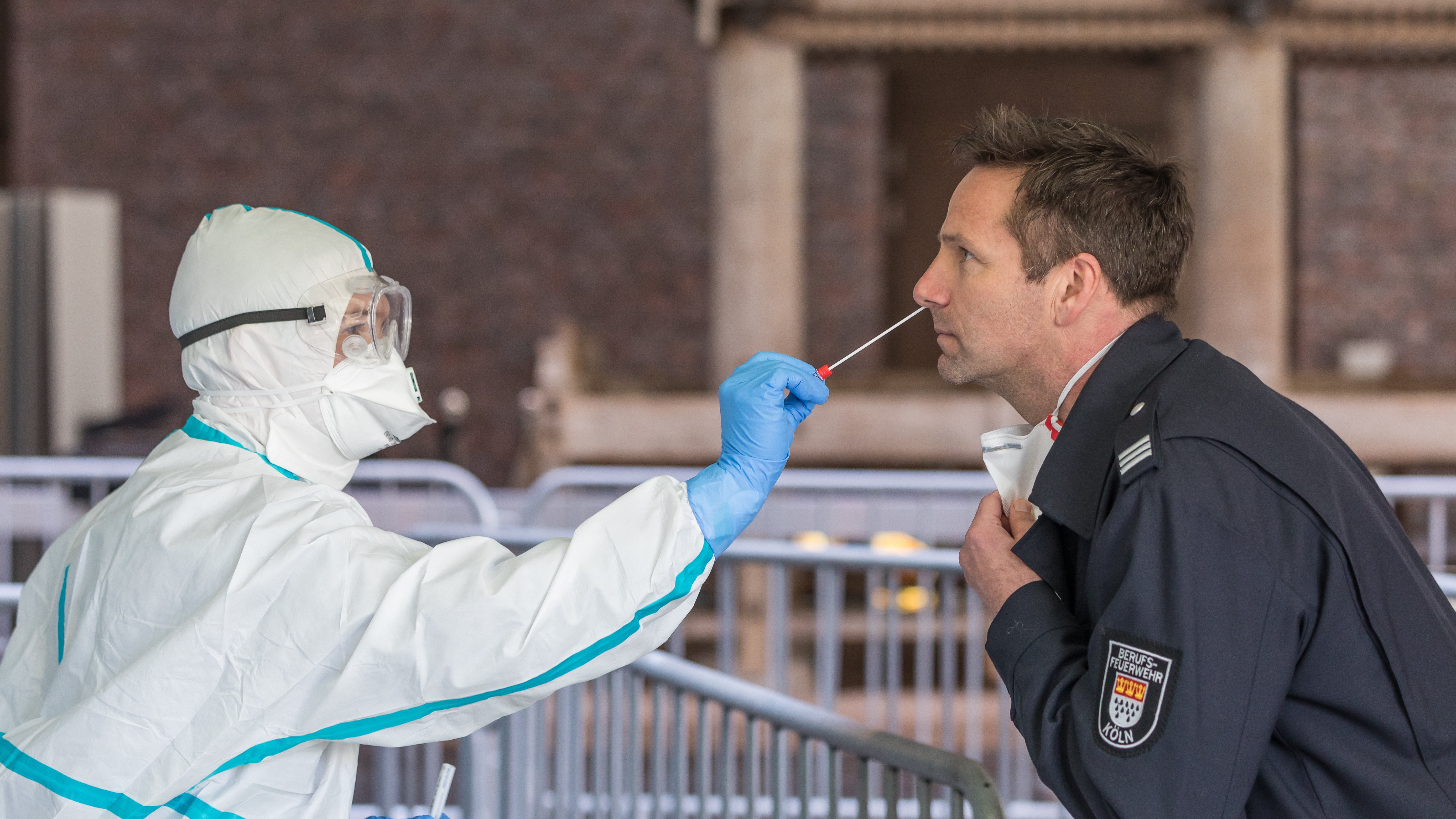 Infektionsschutzzentrum im Kulturquartier/Rautenstrauch-Joest-Museum, Köln. Getestet werden dort ausschließlich Personen, die in sogenannten kritischen Infrastrukturen tätig sind.Mitarbeiter des Infektionsschutzzentrums demonstrieren an einem Feuerwehrmann, der sich als Testperson zur Verfügung stellt, wie ein Abstrich durchgeführt wird.